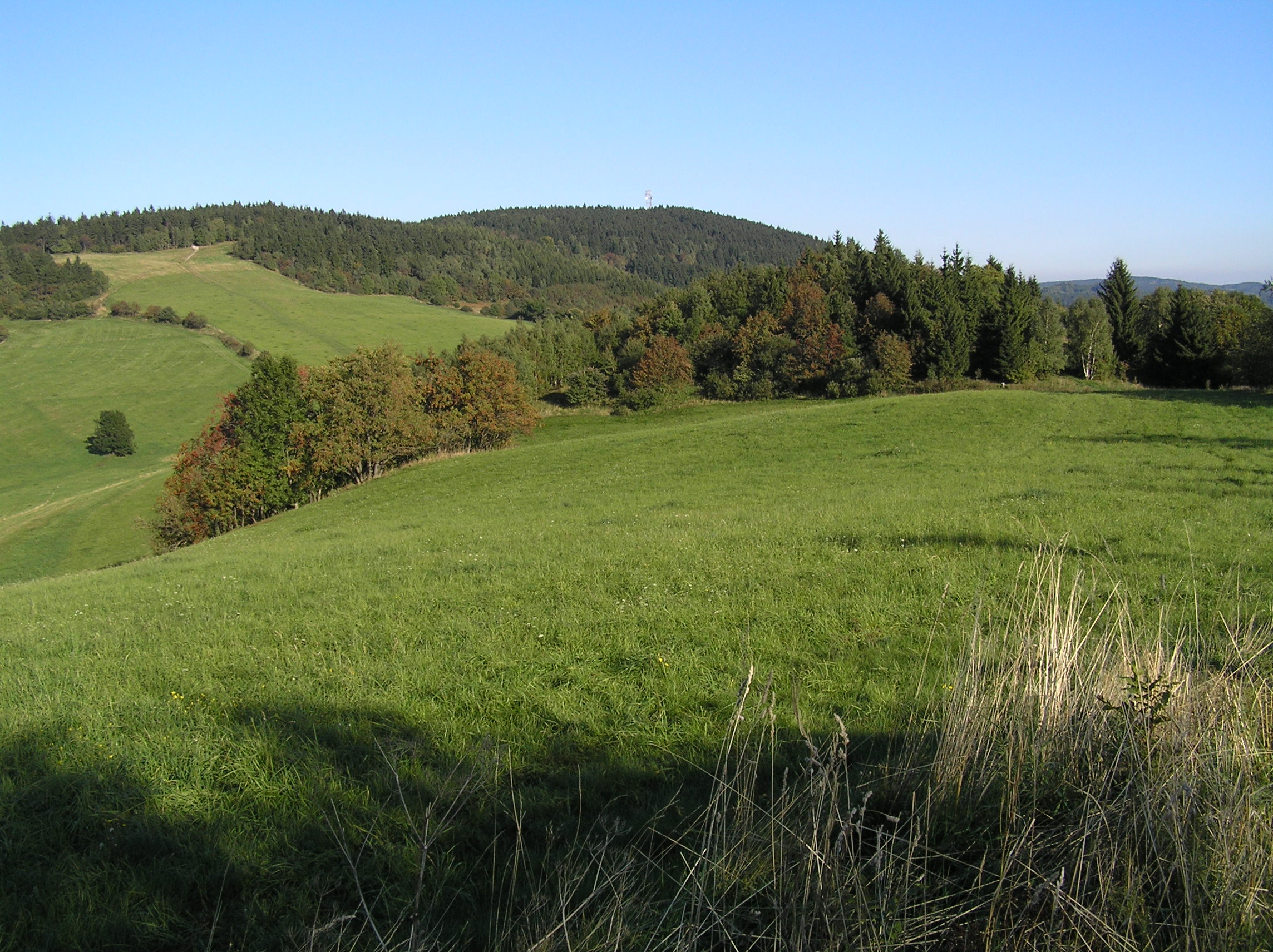 Rašovské sedlo s Javorníkem (684 m n. m.)